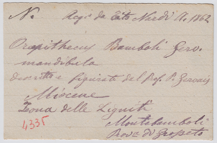 Nota museística de ingreso de un fósil de Oreopithecus bambolii, manuscrita por Igino Cocchi en 1862. Actualmente conservada en la colección del Gabinetto del Regio Istituto di Studi Superiori.